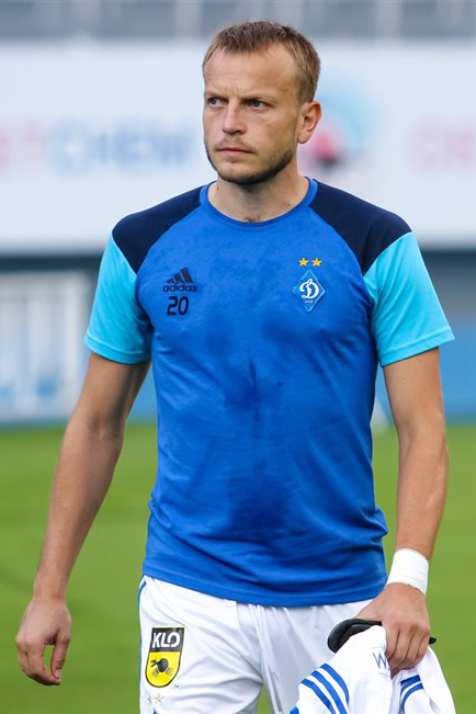 Динамо - Черноморец 2:1